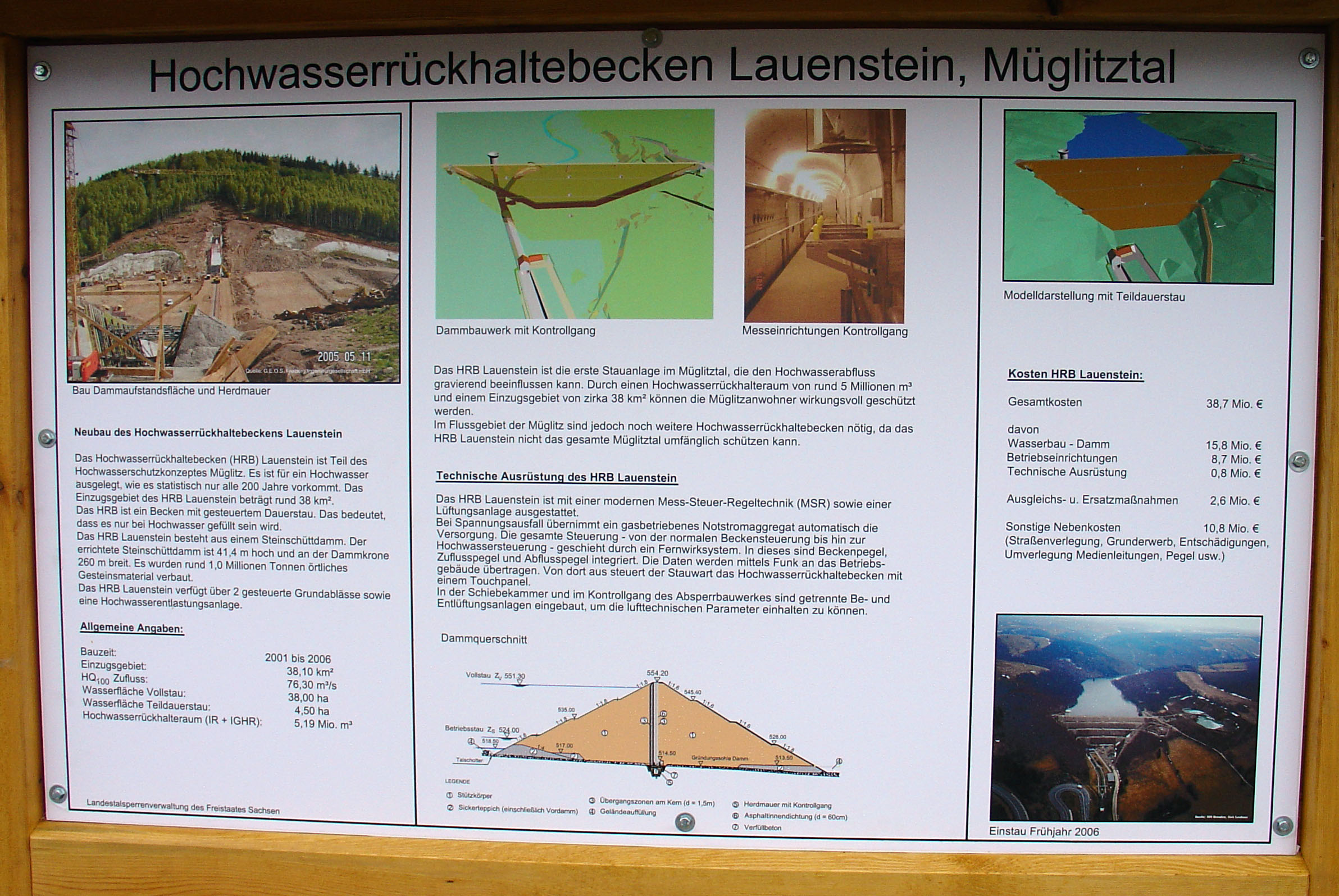 Infotafel am Rückhaltebecken